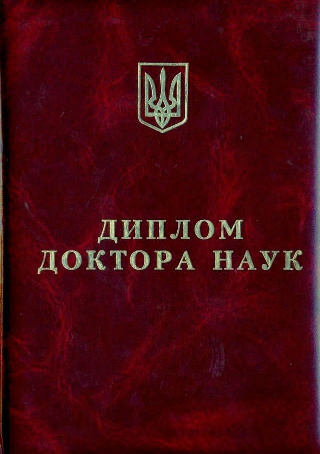 обкладинка диплома доктора наук